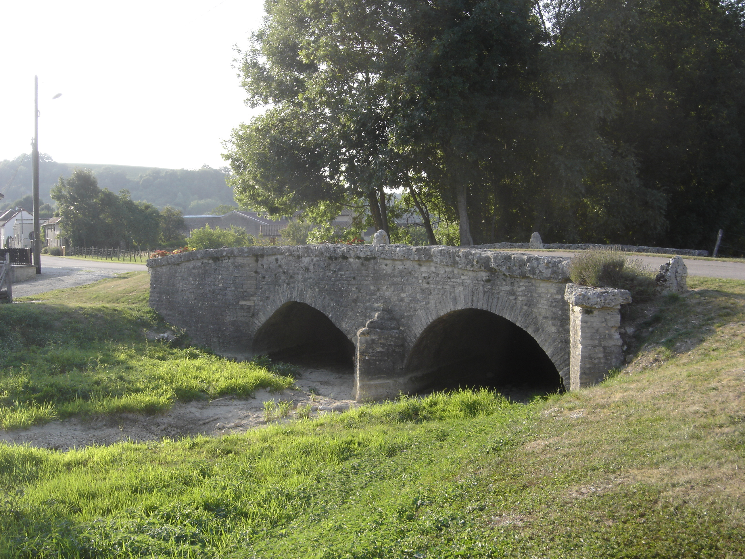 Pont romain de Spoy - Aube - France